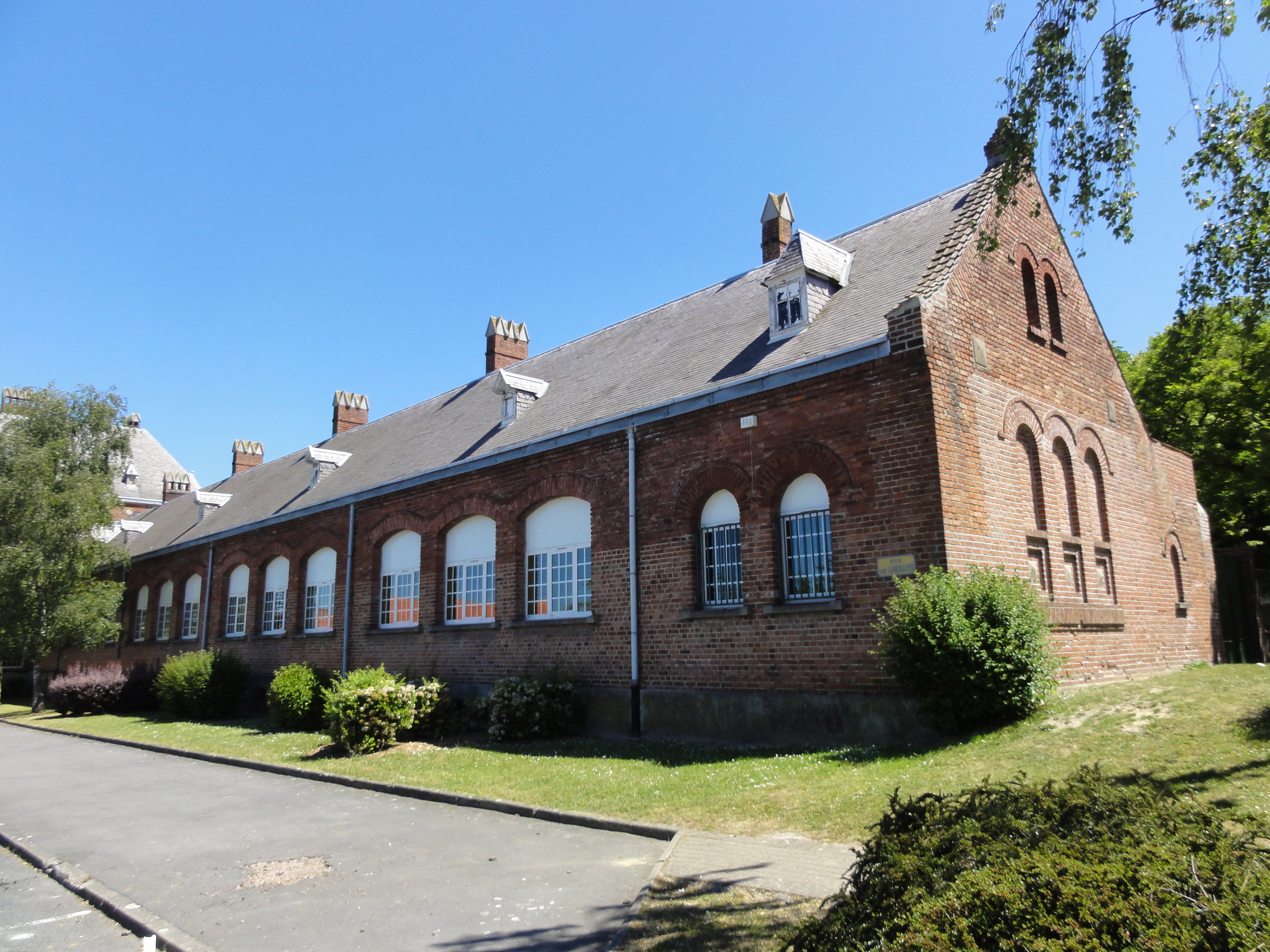 Écoles des cités de la fosse n° 1 - 1 bis - 1 ter de la Compagnie des mines de Béthune, Bully-les-Mines, Pas-de-Calais, Nord-Pas-de-Calais, France.